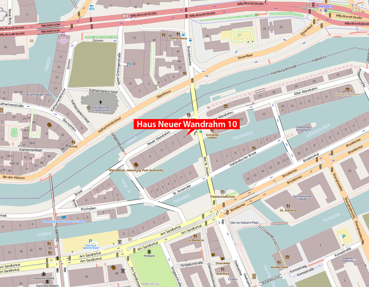 Karte des Hauses Neuer Wandrahm 10 in Hamburg, Deutschland.